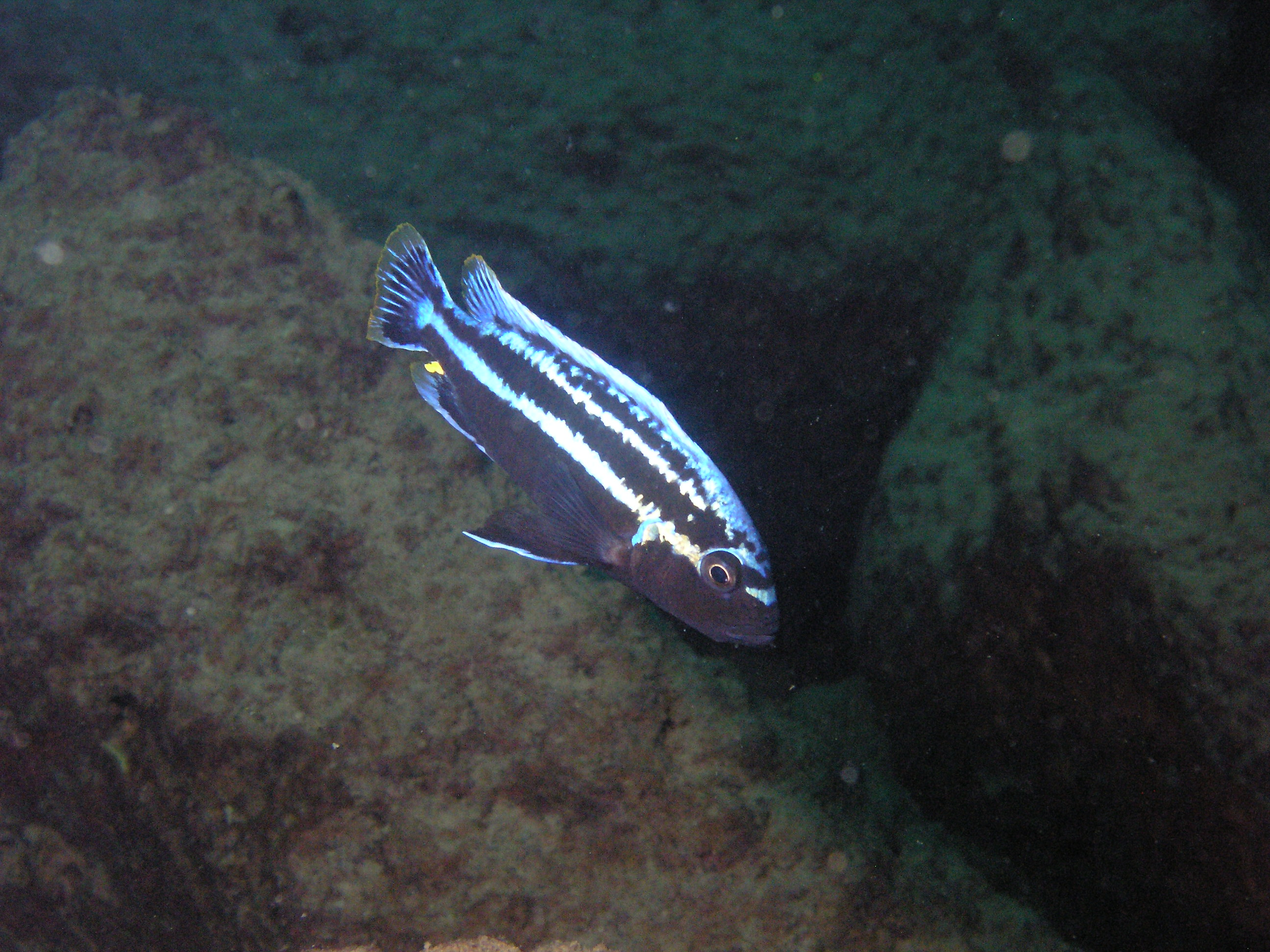 Mbuna in Lake Malawi